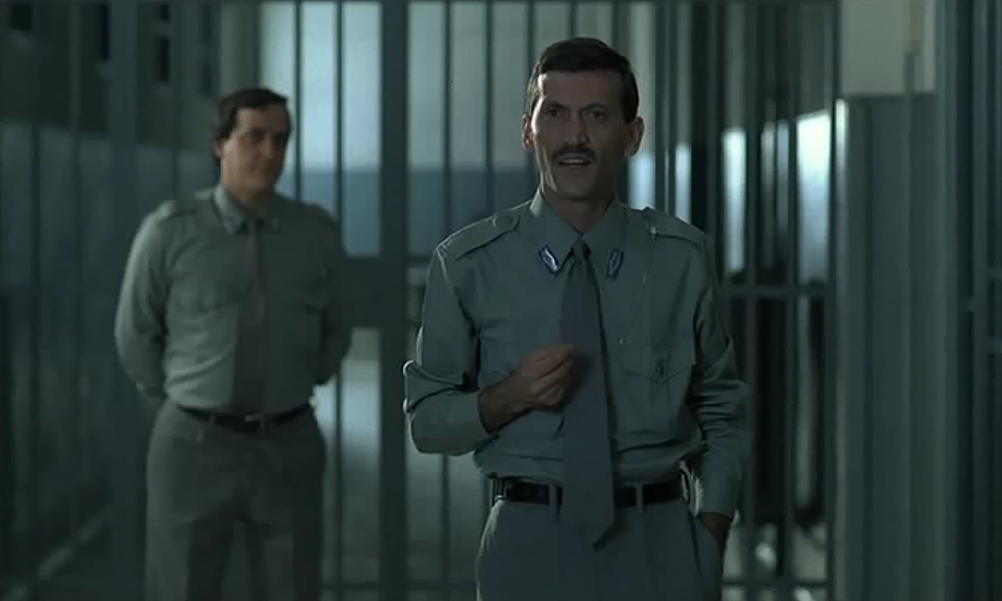 Screenshot del film Mery per sempre (1989).